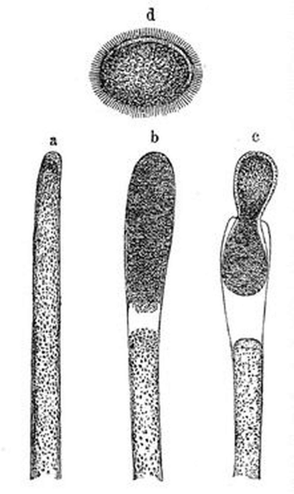 Vaucheria sessilis (zoospore and sporabiospore)